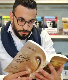 شربل رحمة خلال إمضاء روايته الثالثة "...وقَتَلت بيّي"، في معرض الكتاب الدولي في مجمّع "بيال" في العاصمة اللبنانية بيروت.auth